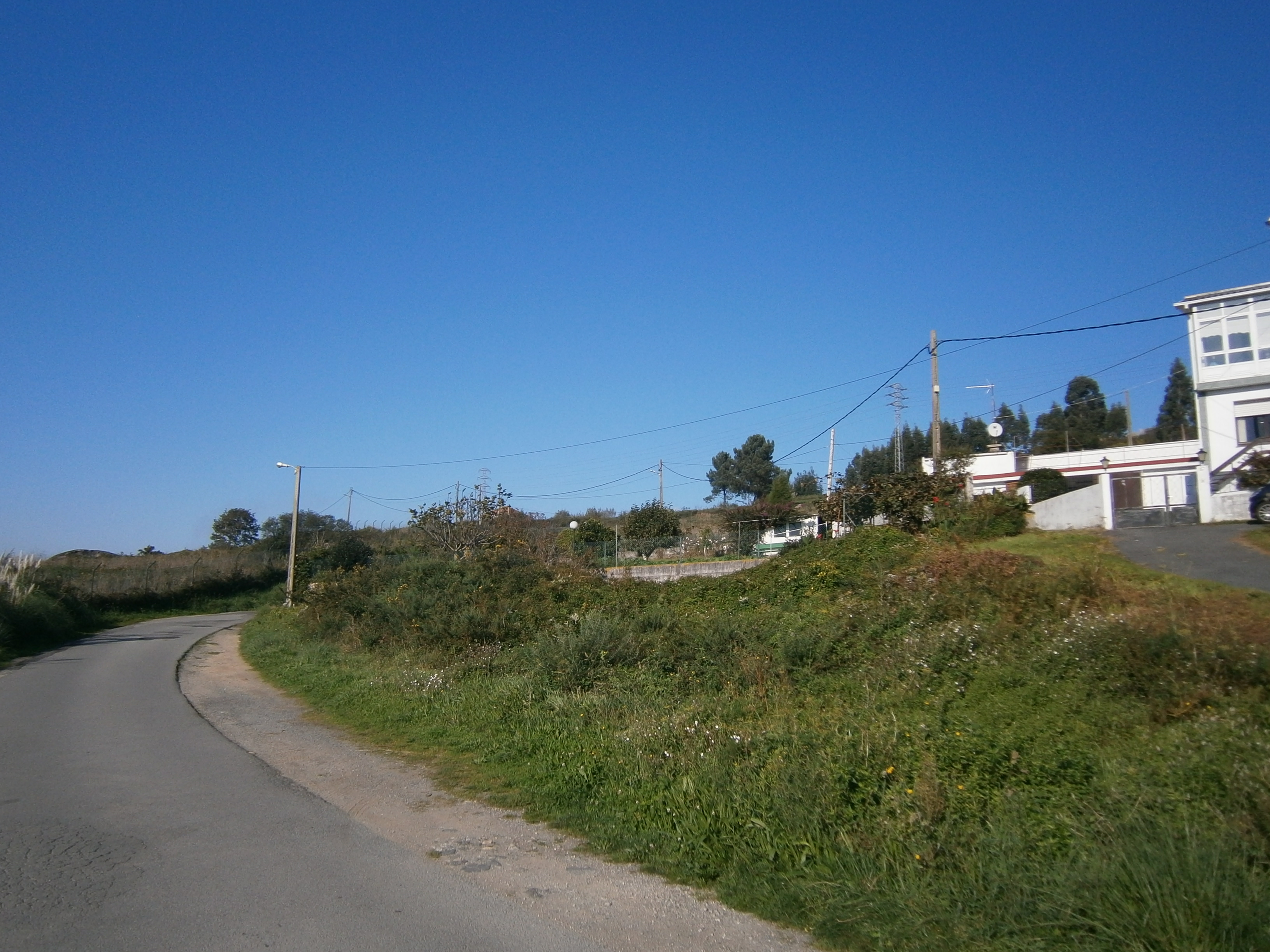 Monte Mero, na Coruña